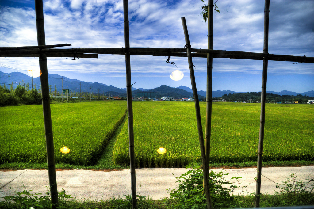 Damyang-Rice paddy field